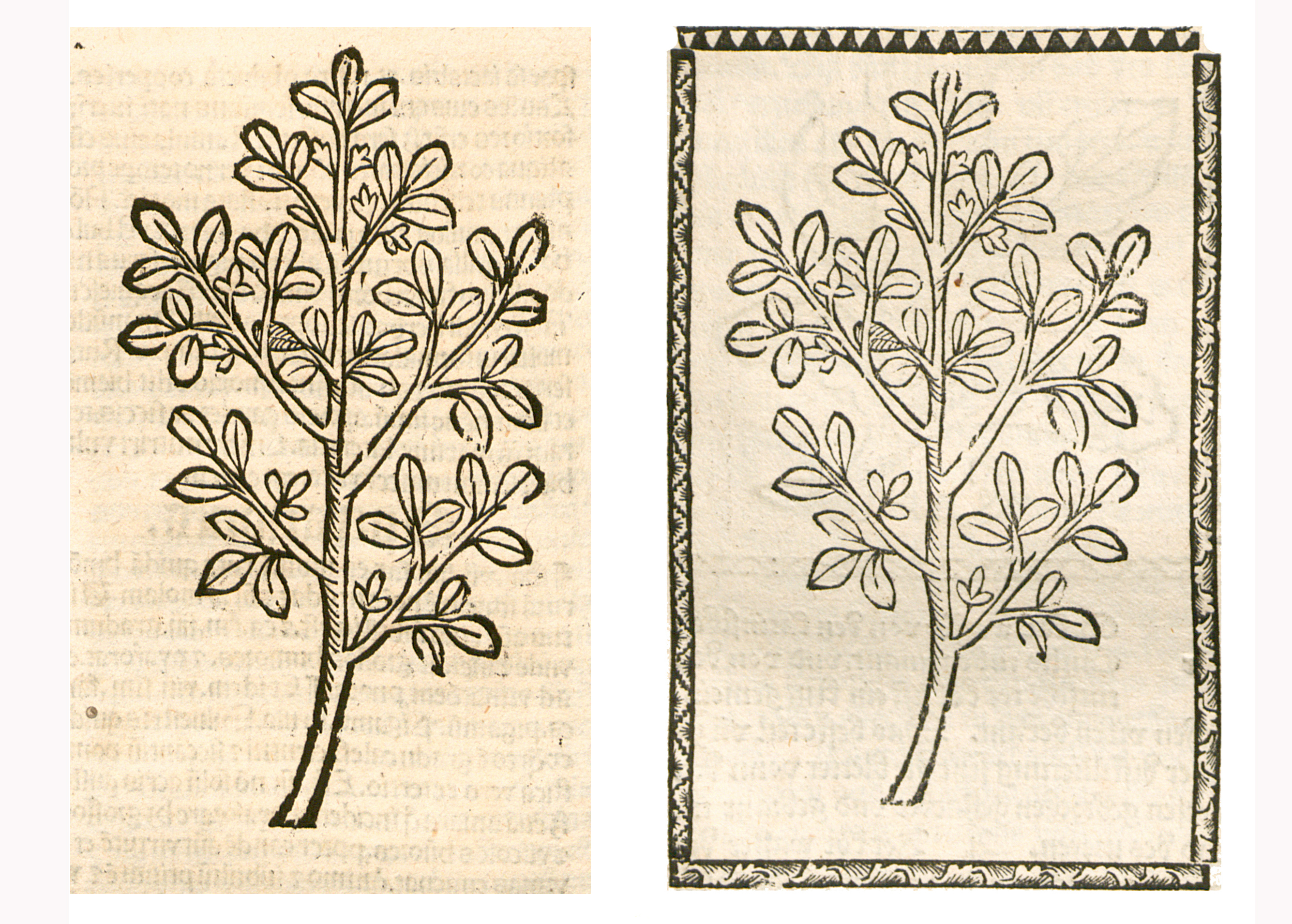 Abbildung von: Rute (Ruta graveolens)